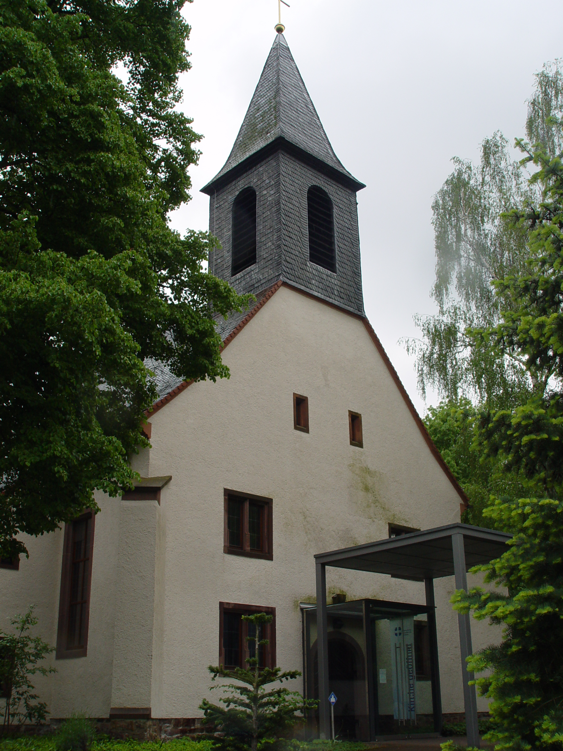 Kirche Hagsfeld